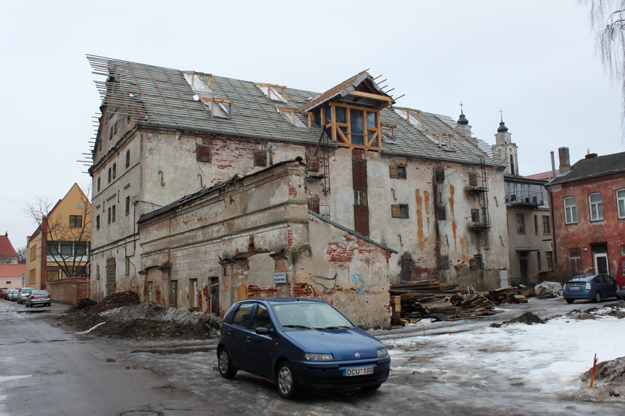 Senieji Hansos sandėliai.